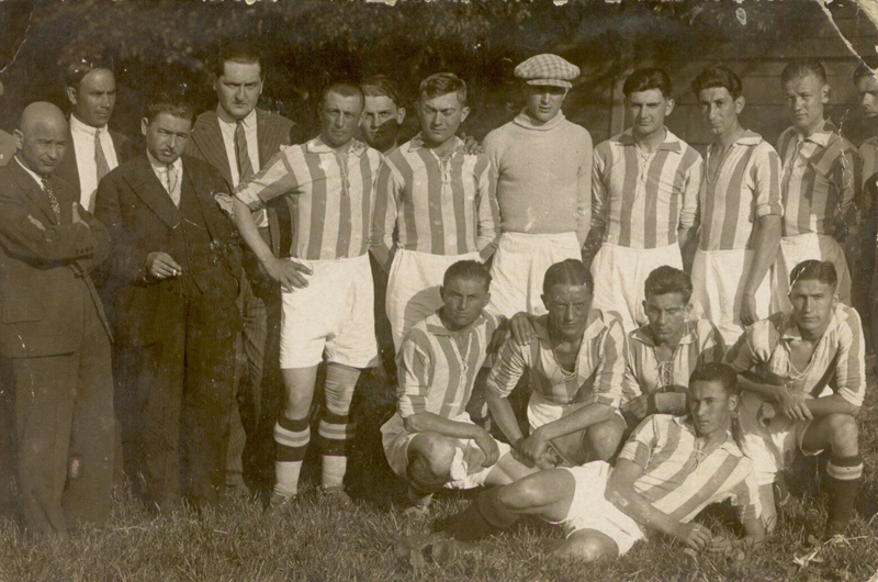 Chinezul Timisoara - anul 1924